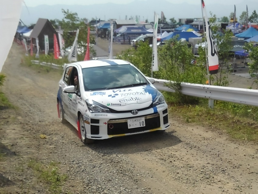 全日本ラリー選手権にて、天野智之/井上裕紀子組のトヨタ・ヴィッツ